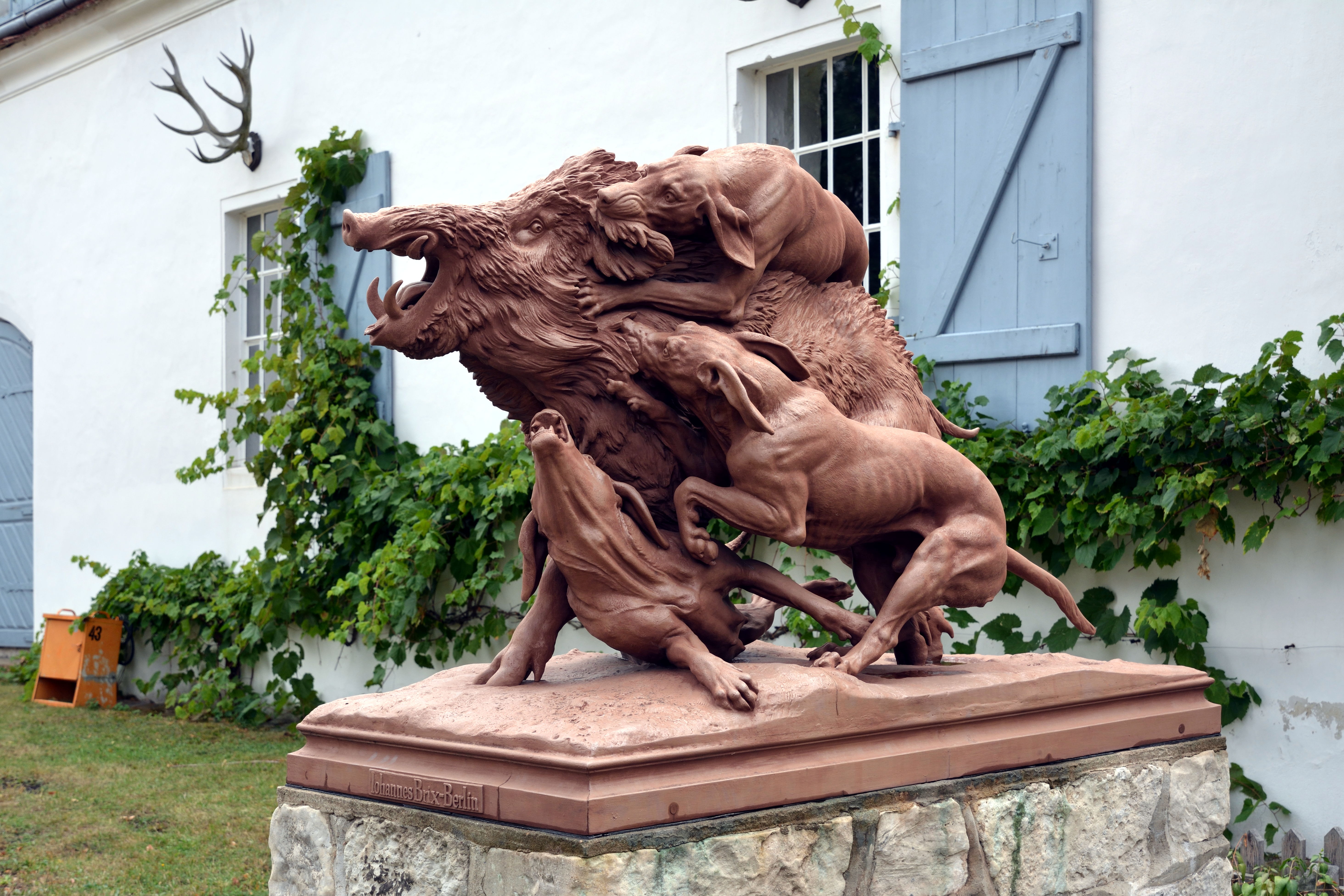 Impressionen aus dem Jagdschloss Grunewald.Hier: "Wildschweinjagd" von Friedrich Wilhelm Wolff. Der am Sockel angebrachte Name "Johannes Brix" aus Berlin bezieht sich auf den Eisengiesser.